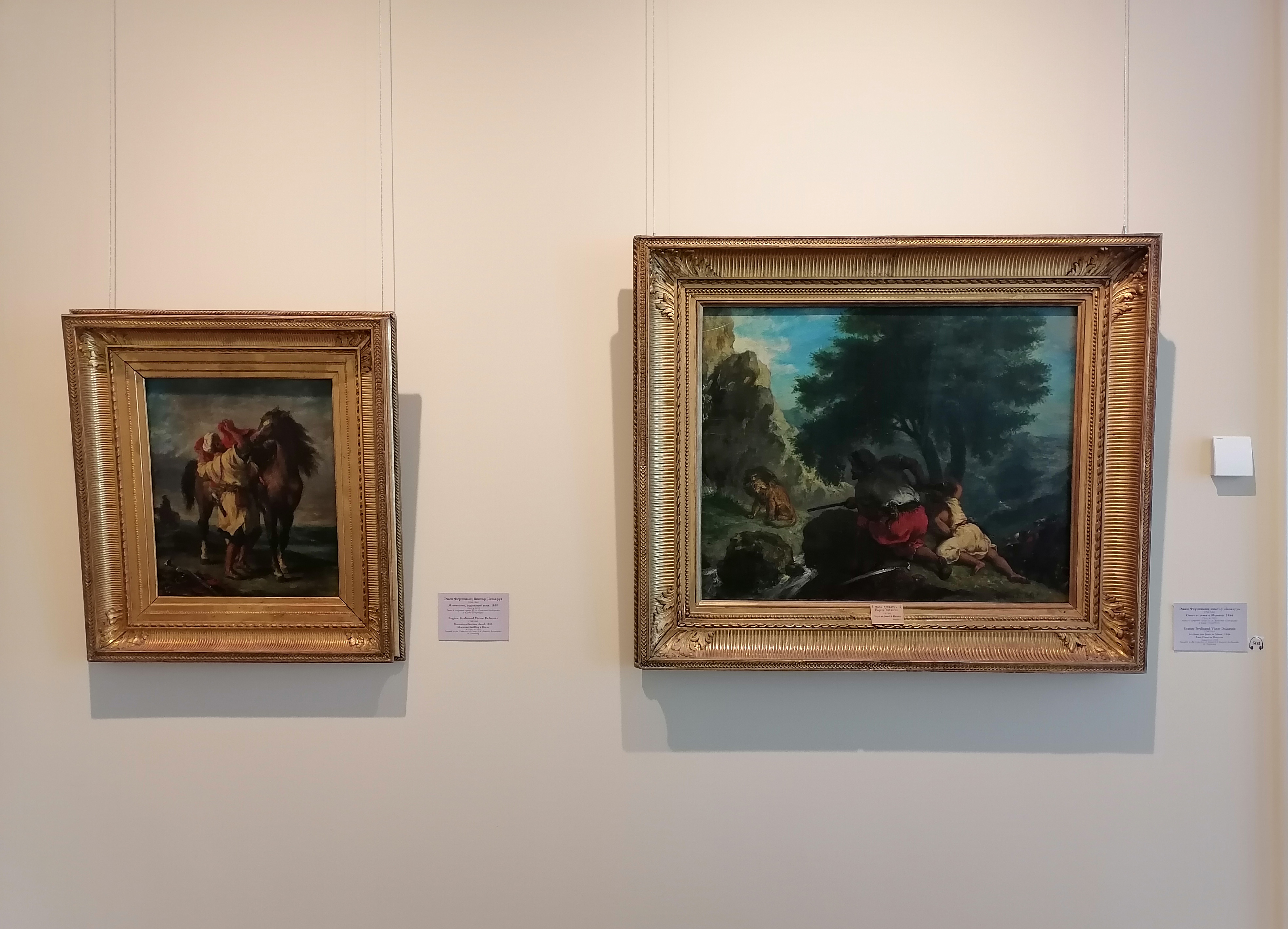 Здание Главного штаба - зал 308 - Эжен Делакруа "Марокканец, седлающий коня", его же "Охота на львов в Марокко"